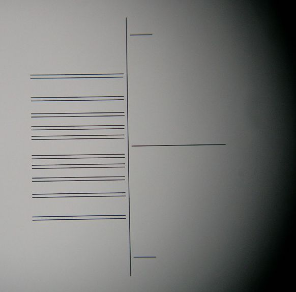 Fadennetz des Ni2-Astrolabs